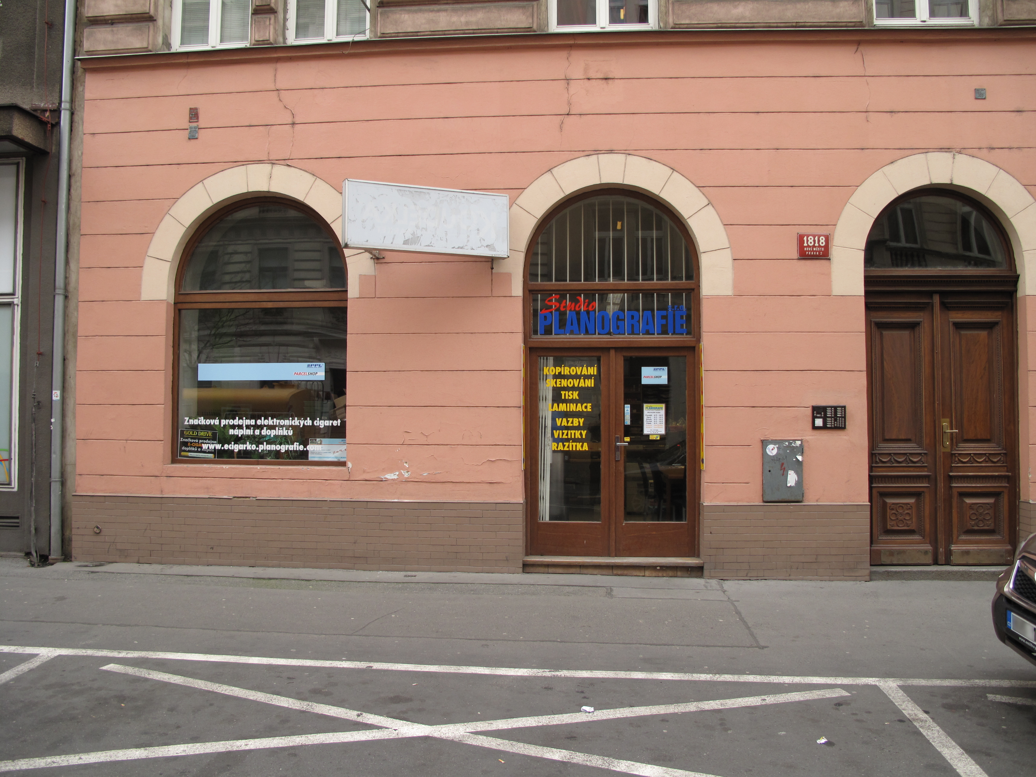 ParcelShop ve Studiu Planografie v Rumunské 4 v Praze 2. Praha, Česká republika.